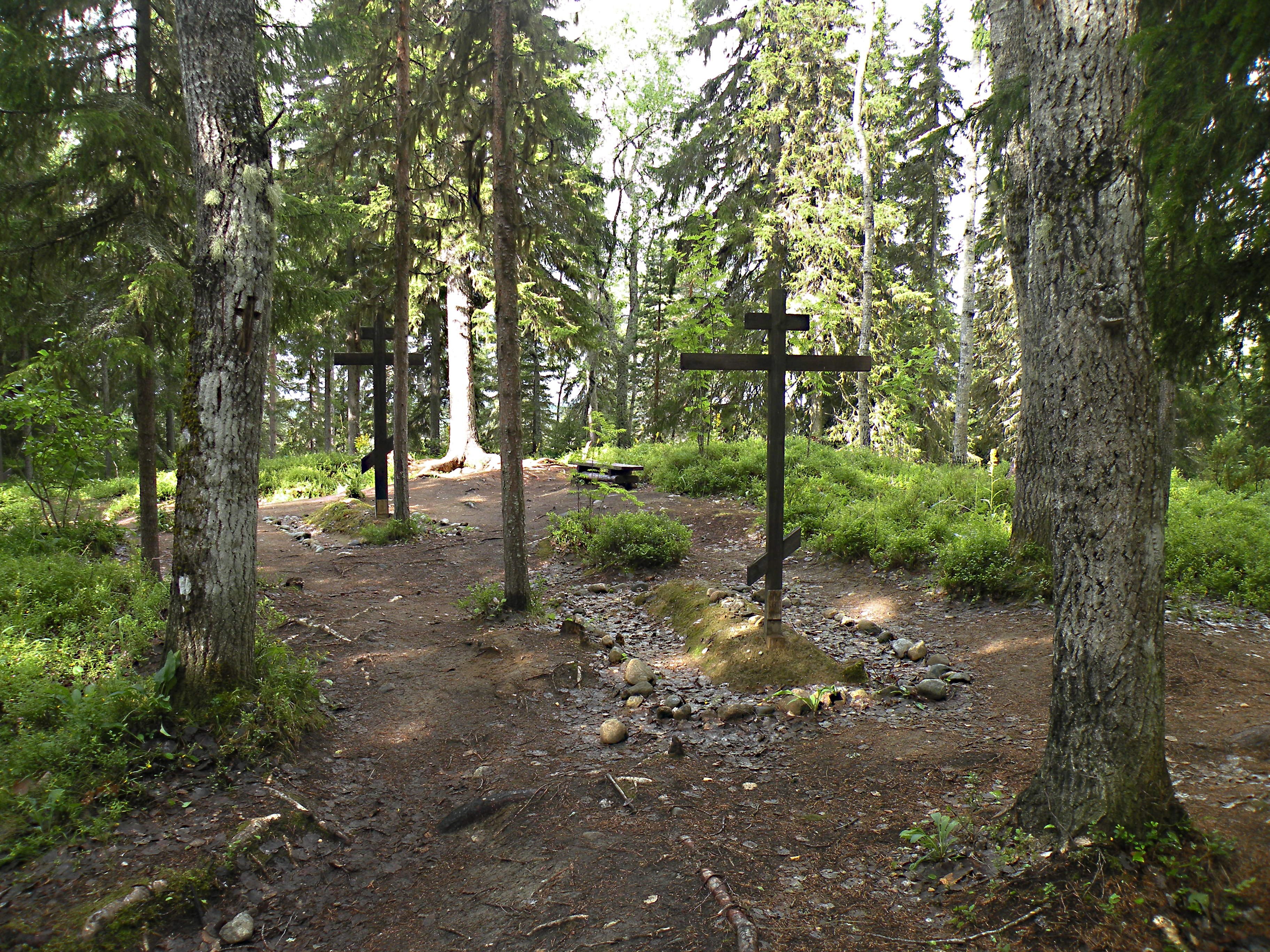 Большой Соловецкий остров.Места массовых захоронений узников штрафного изолятора на Секирной горе